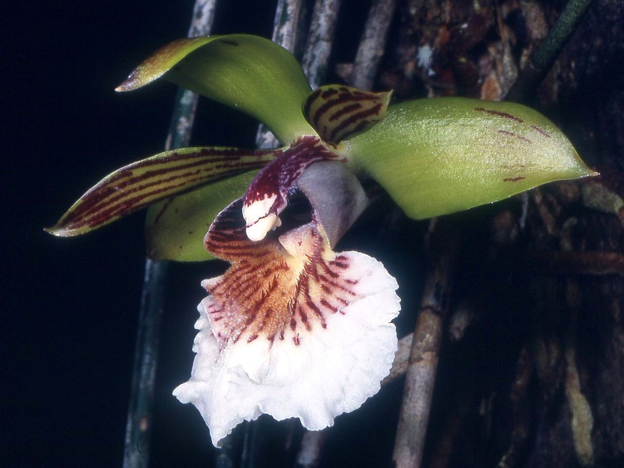 Scuticaria salesiana - flower